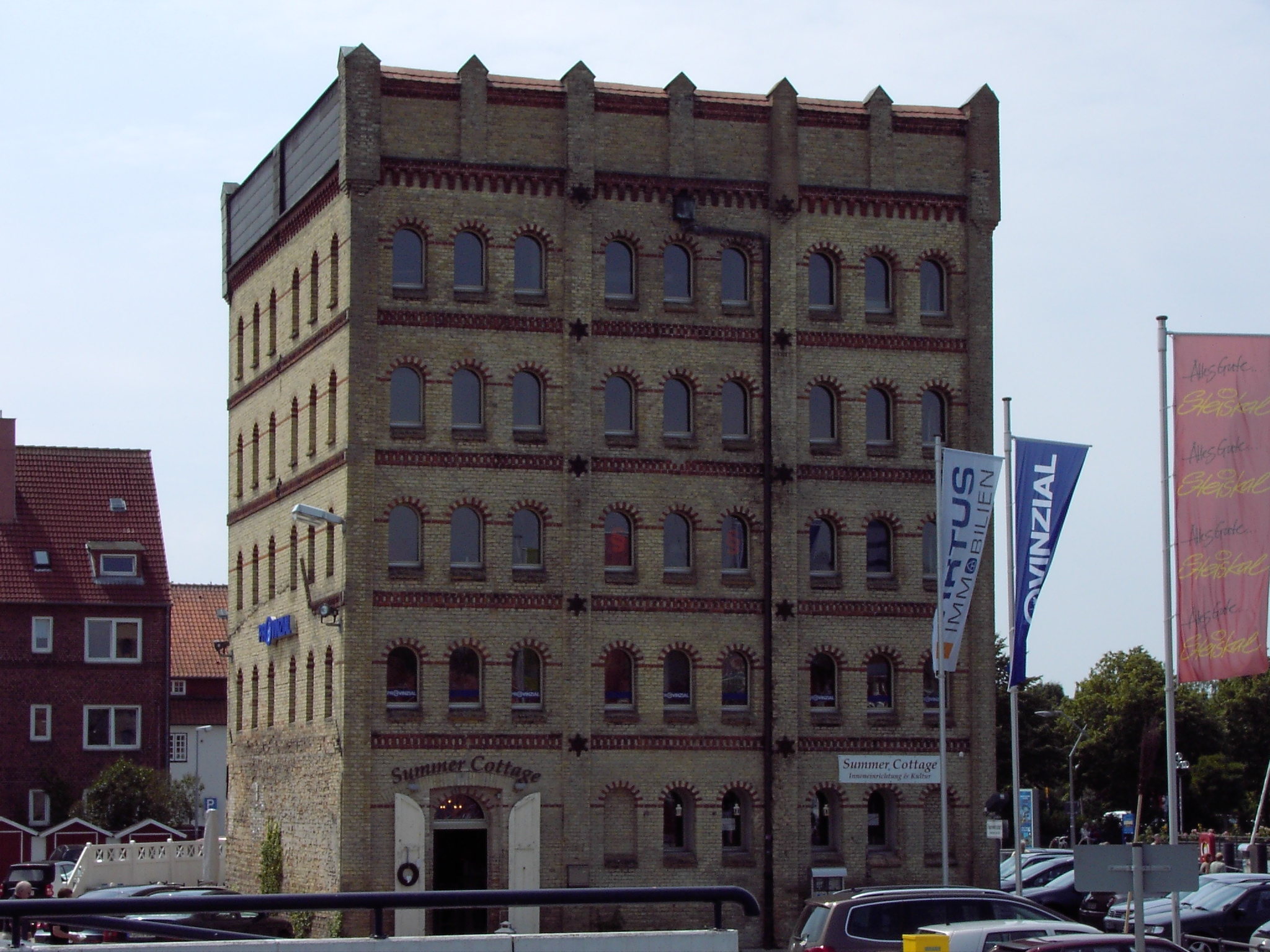 Denkmalgeschützter Siemsen-Speicher in Eckernförde